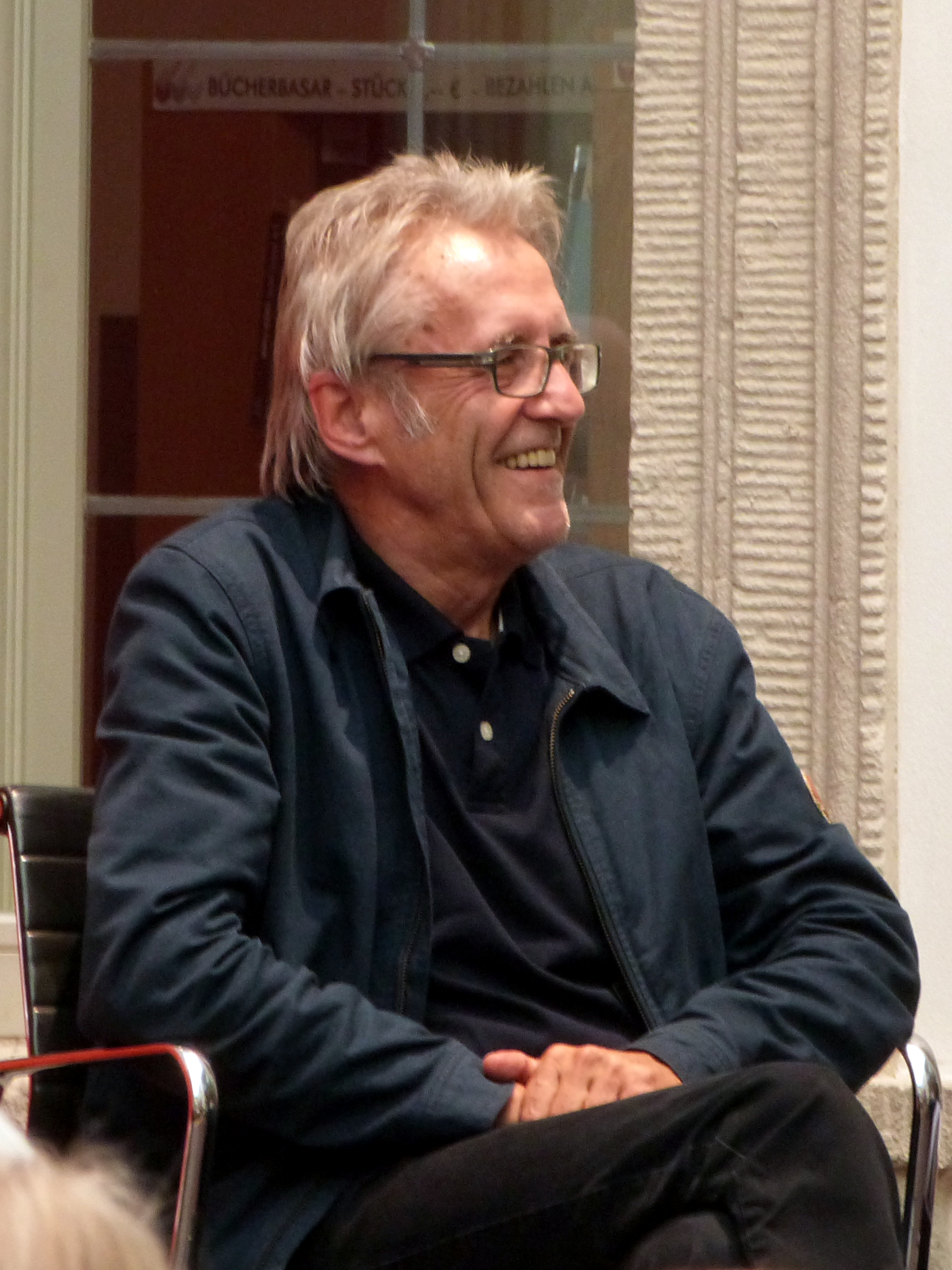 Der Autor und Kulturmanager Klaus Kufeld bei einer Diskussionsrunde auf dem Erlanger Poetenfest 2017.